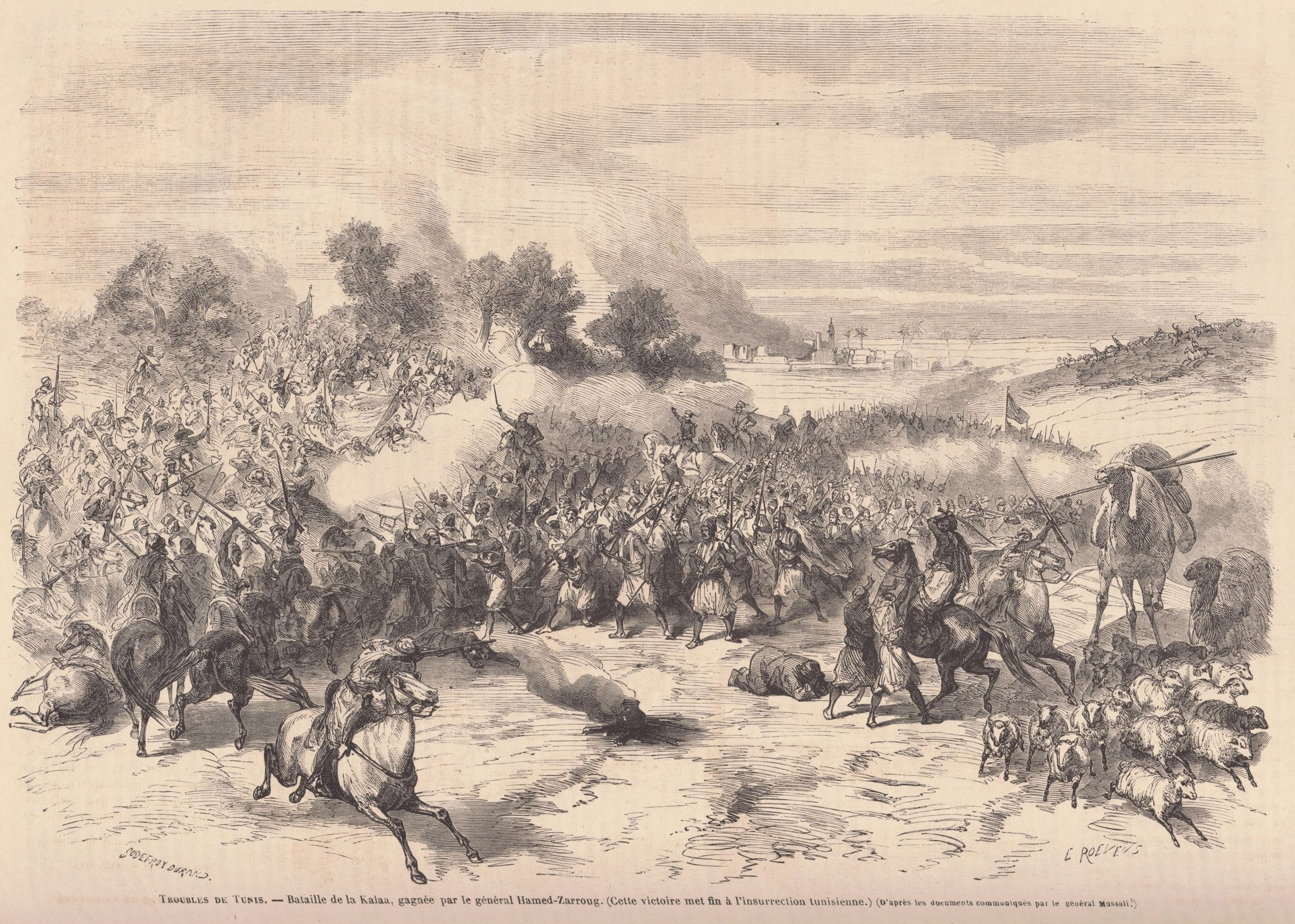 Gravure représentant la bataille de Kalaa Kebira du 7 octobre 1864 où l'armée du général Zarrouk met en déroute les forces insurgées. Parue dans le journal français "Le Monde Illustré" du 26 novembre 1864